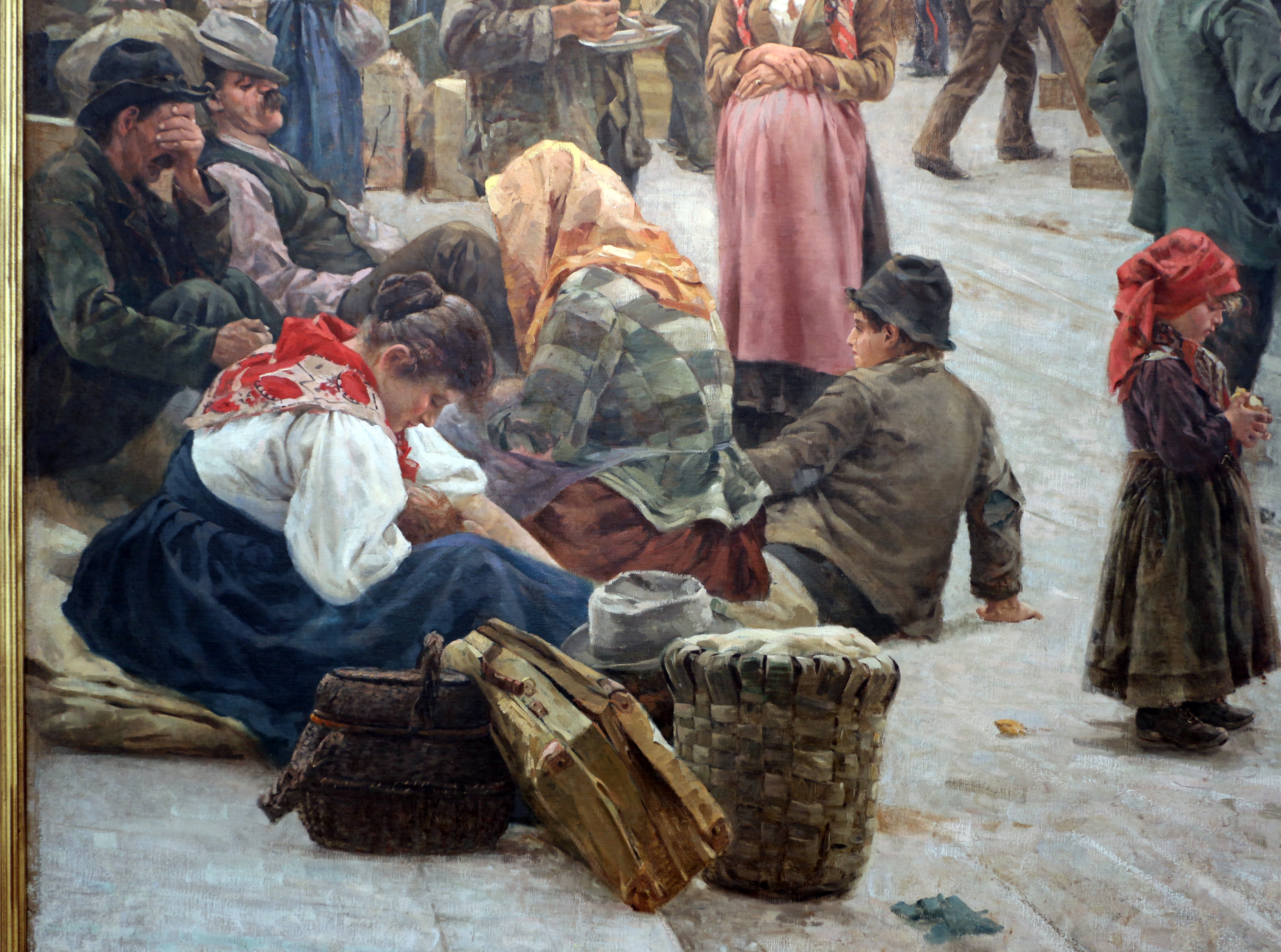 detail